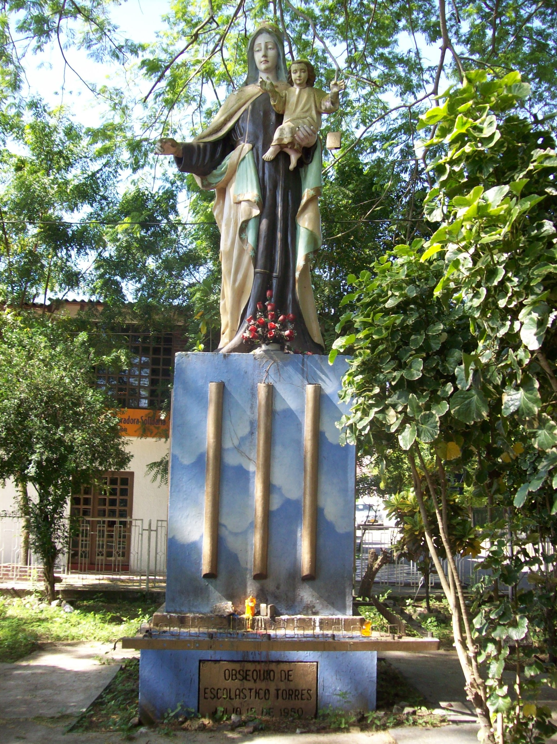 Estatua de la vírgen en La Dorada.